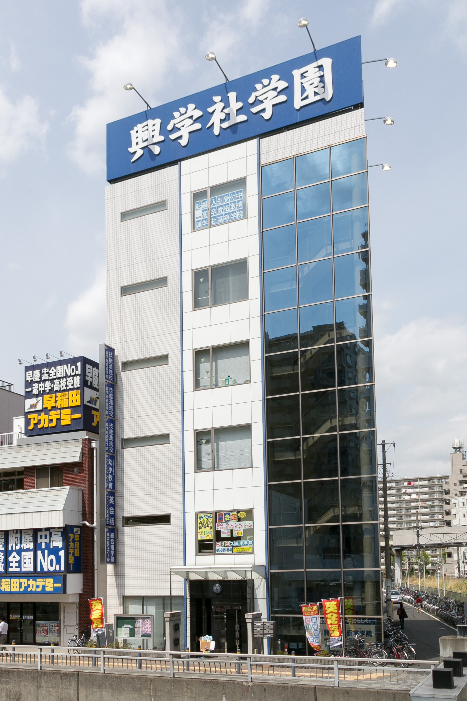 興学社高等学院の校舎